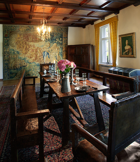 Kuva Laukon kartanon 1931 rakennetun päärakennuksen salista. Antiikin ovat keränneet Juhani ja Leena Lagerstam.